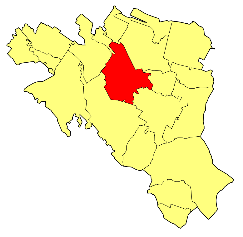 Położenie sołectwa Kuźniki w gminie Ostrzeszów.